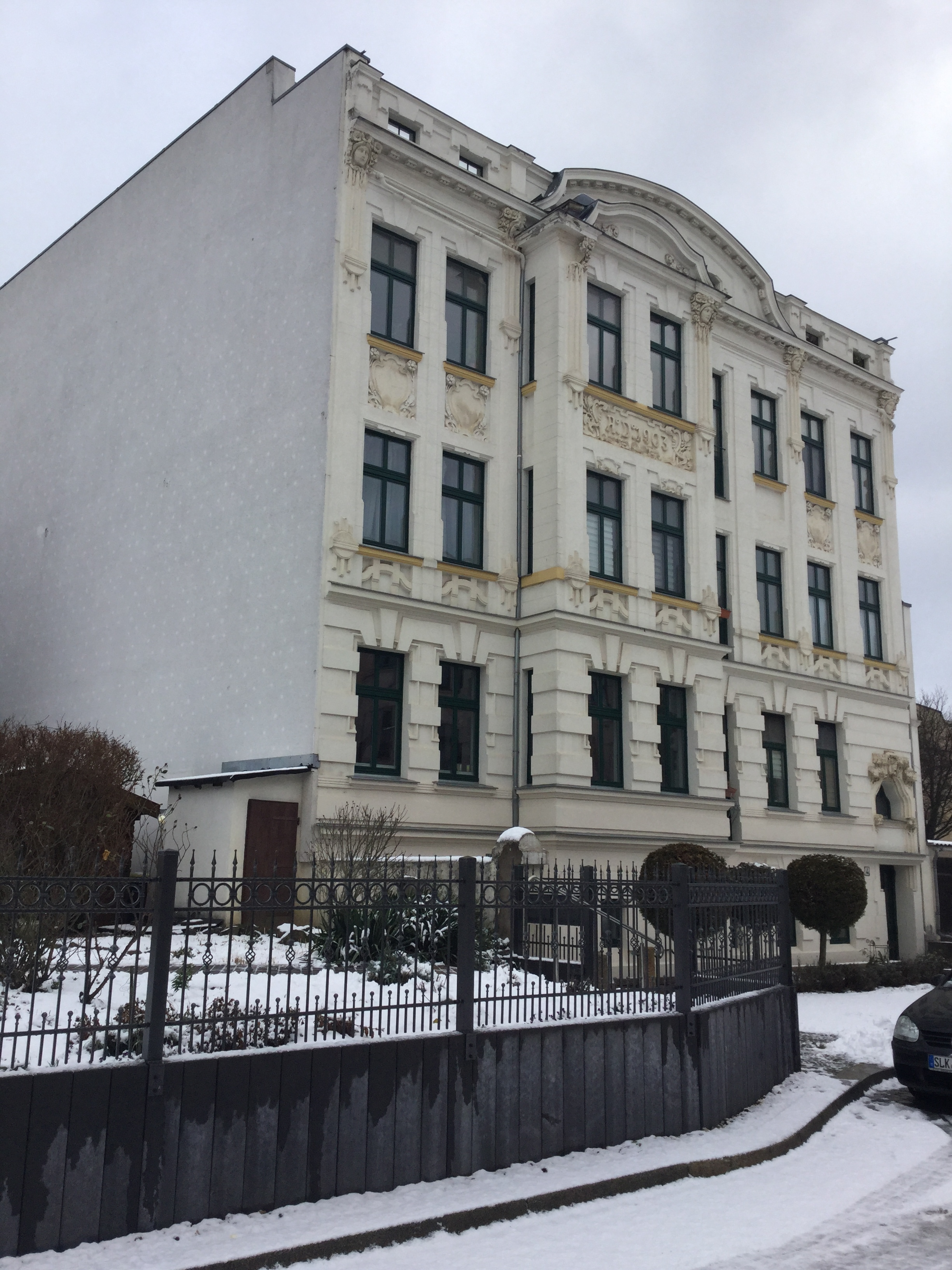 Kühleweinstraße 4